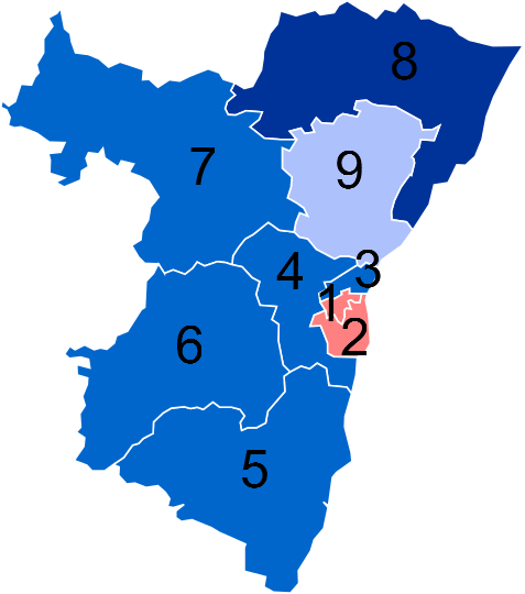 Résultats des élections législatives du Bas-Rhin en 2012